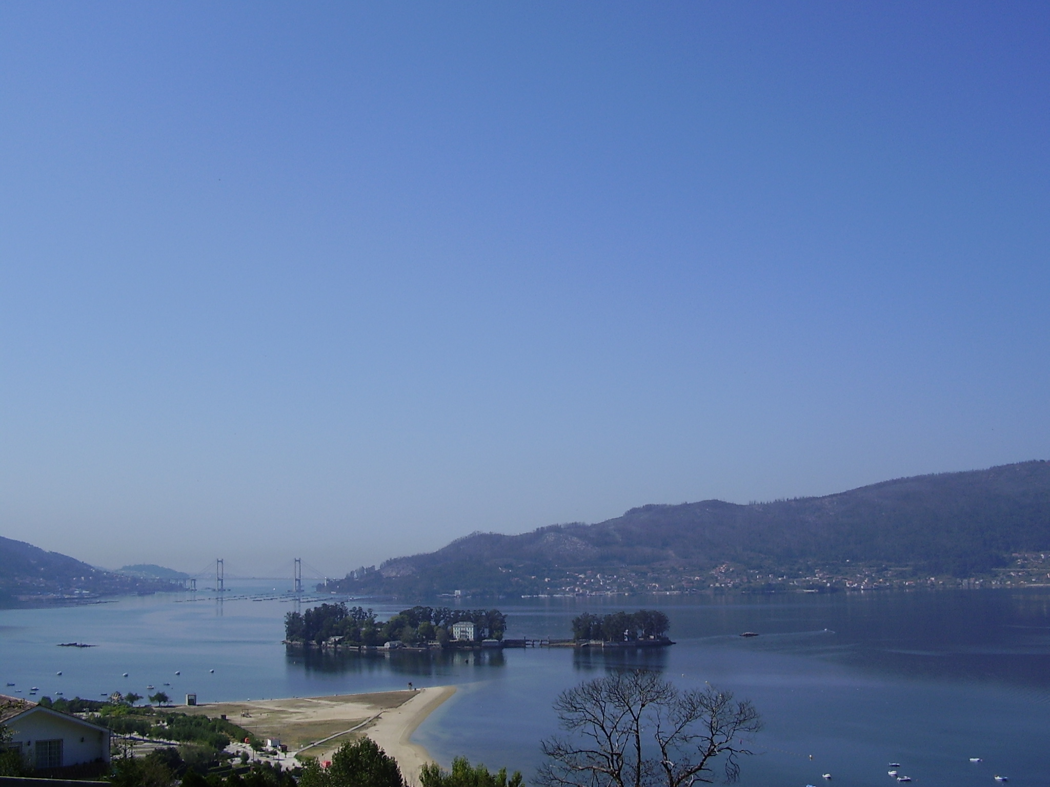 Isla de San Simon desde Cesantes, Redondela